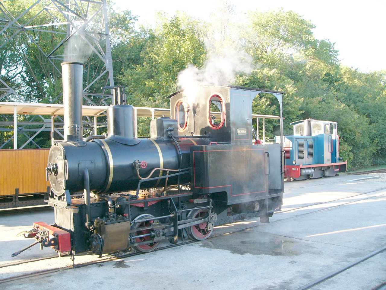 Locomotive à vapeur sur voie de 60 Orenstein & Koppel, type 020T au Chemin de fer des Chanteraines Locomotive "Bertha", 020T Orenstein & Koppel de 1905 N° 1627. Construite à Berlin en 1905, elle a été livrée à Liebold & Co, Langbrück le 26 juillet 1905. Dernières affectations : Etablissement LECAT à Péronne (Somme), puis Chemin de Fer d'Intérêt Privé à Dannemois Seine et Marne. Arrivée au CFC le 23/05/1992. la chaudière a été changée avant la remise en service